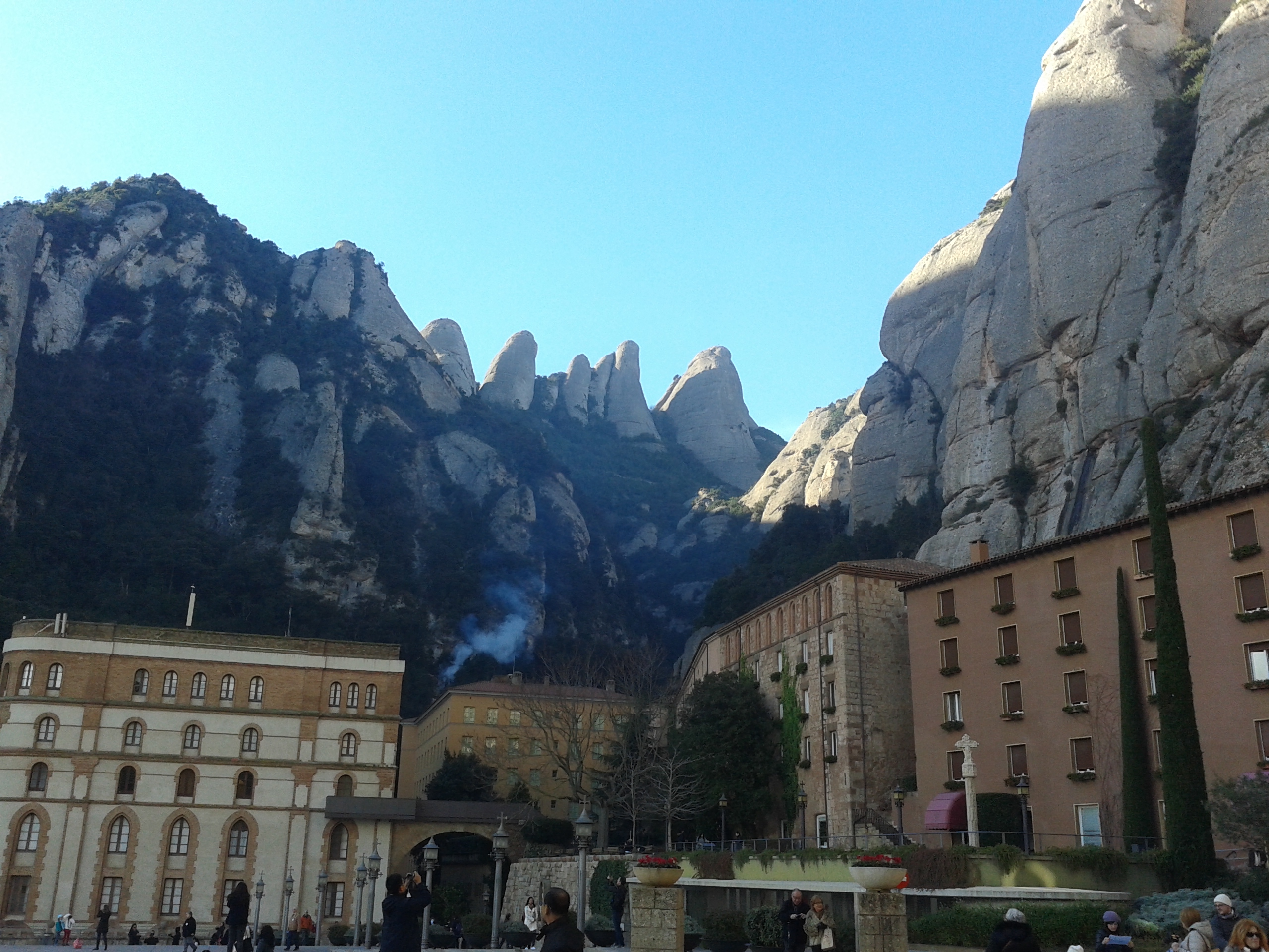 Մոնսերրատի աբբայության շինություններն ու ատամնավոր լեռները